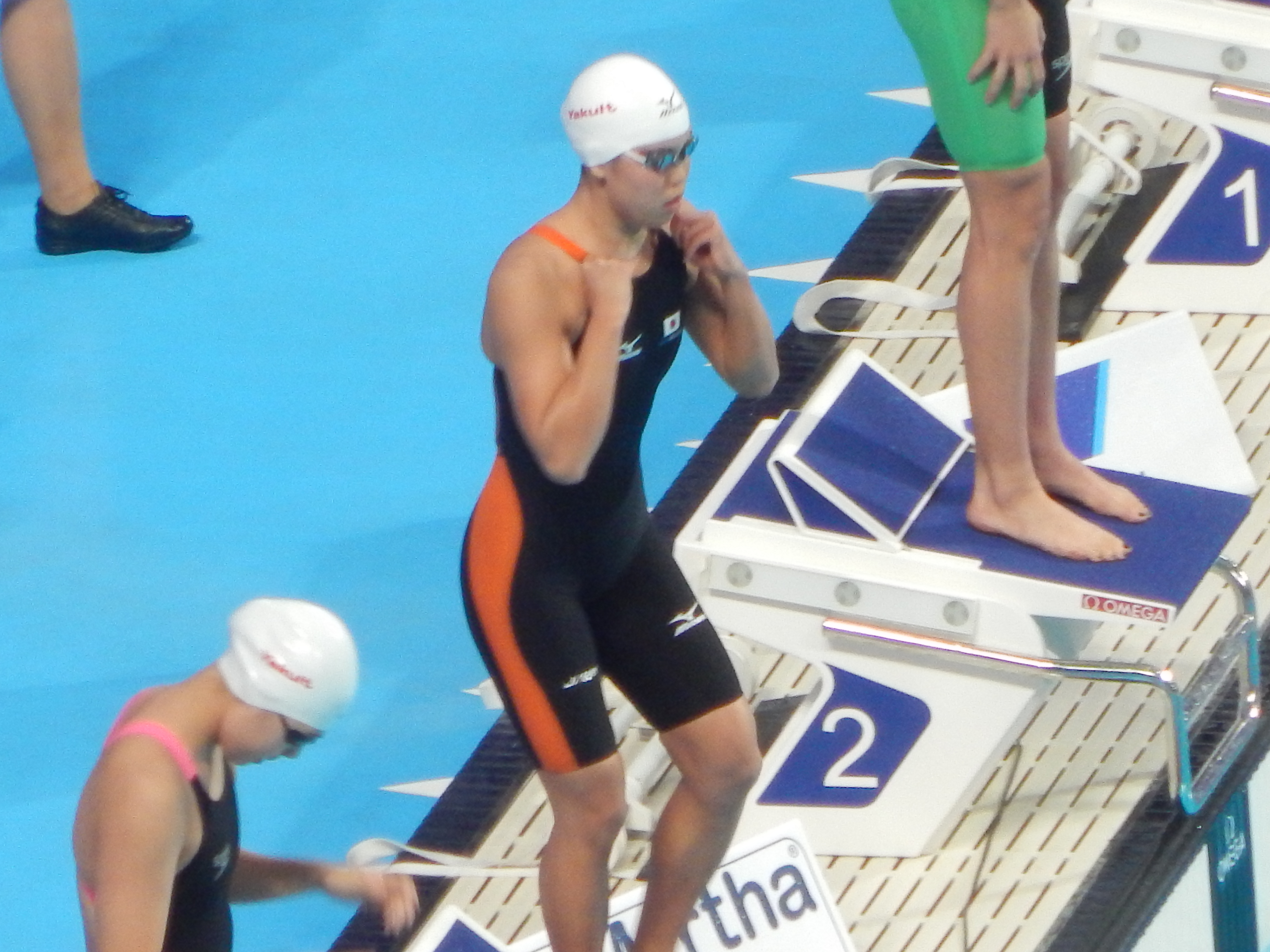 Нацуми Хоши в полуфинале 200 метров баттерфляем у женщин